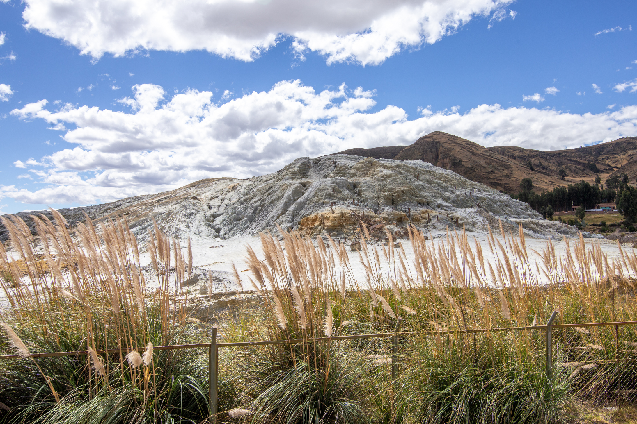 Foto tomada durante el Paseo Turístico, Educativo y Fotográfico organizado por Wiki Loves Andes el 20 de julio de 2019 para conocer parte del patrimonio minero en la provincia de Recuay, Áncash.